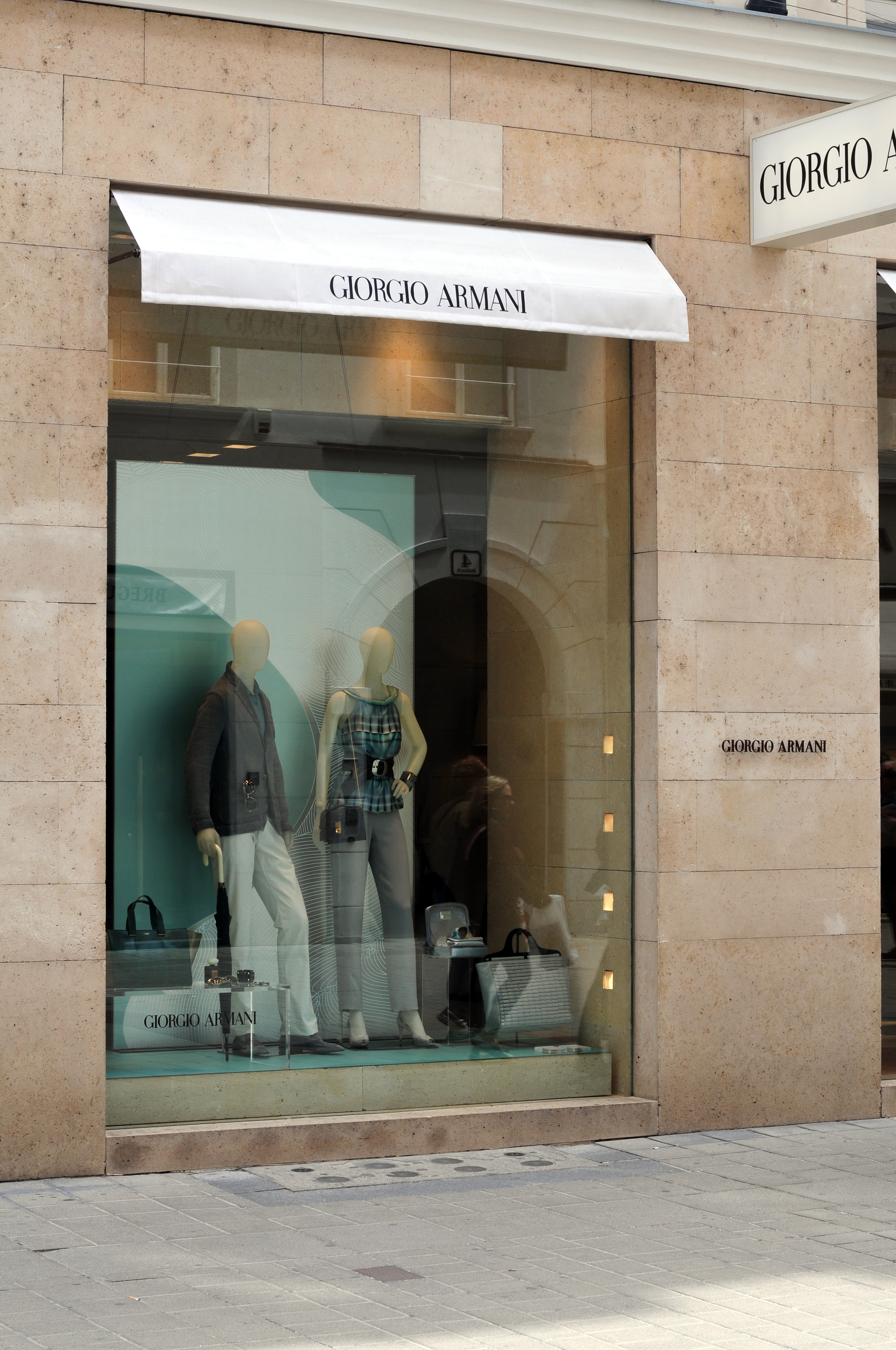 Wien